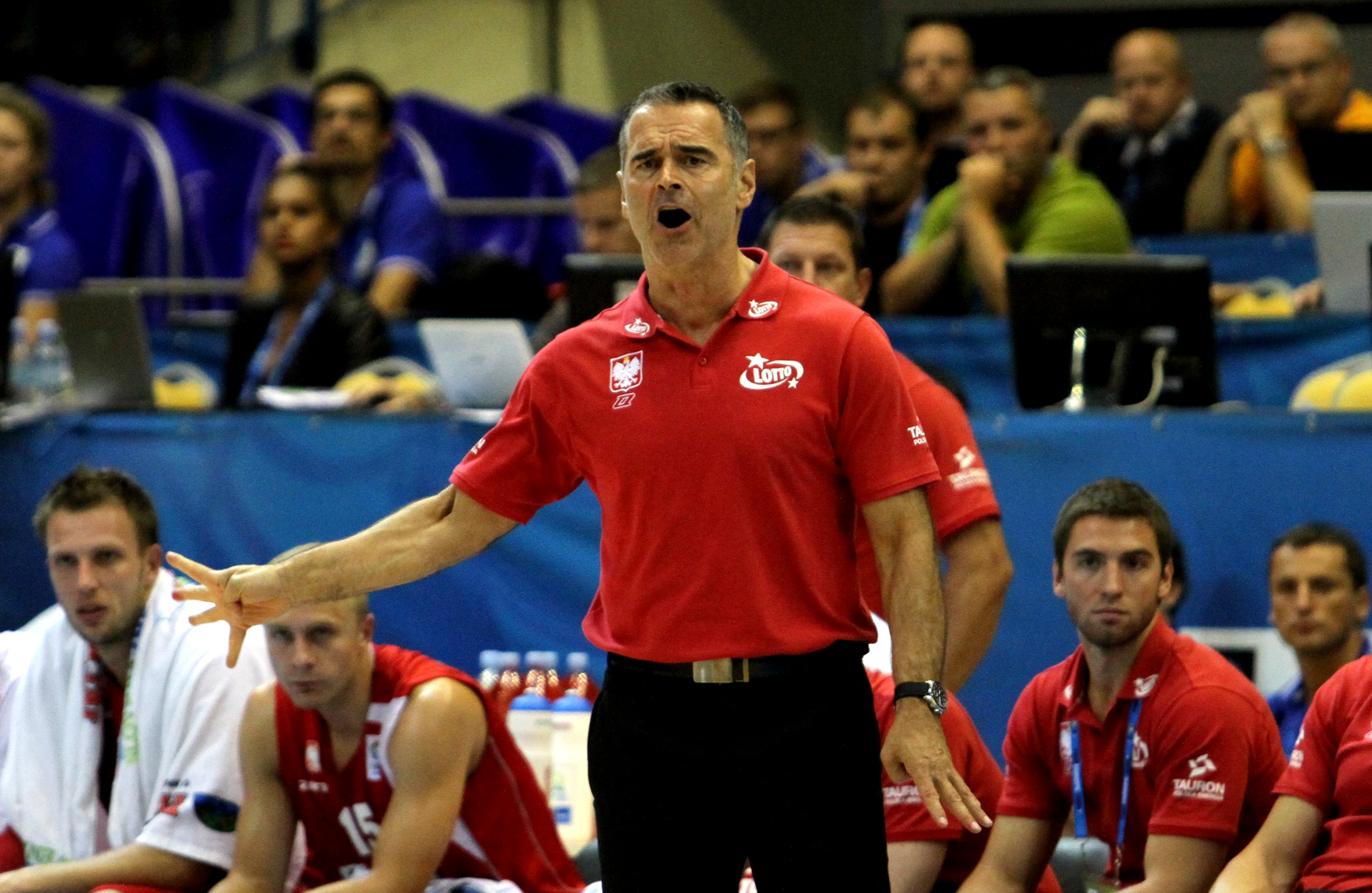 Reprezentacja Polski koszykarzy z 2013 roku. Dirk Bauermann